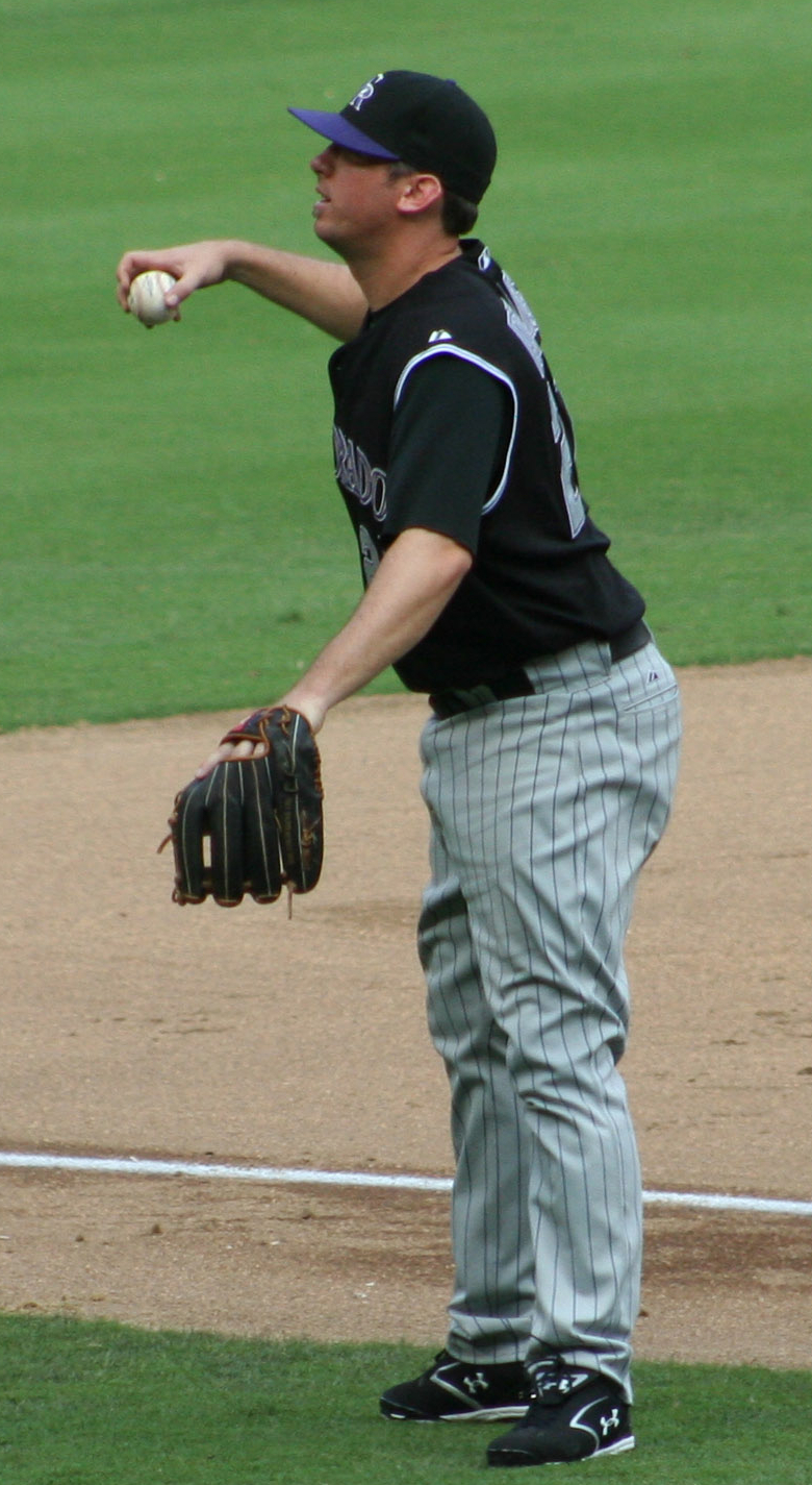 Garrett Atkins